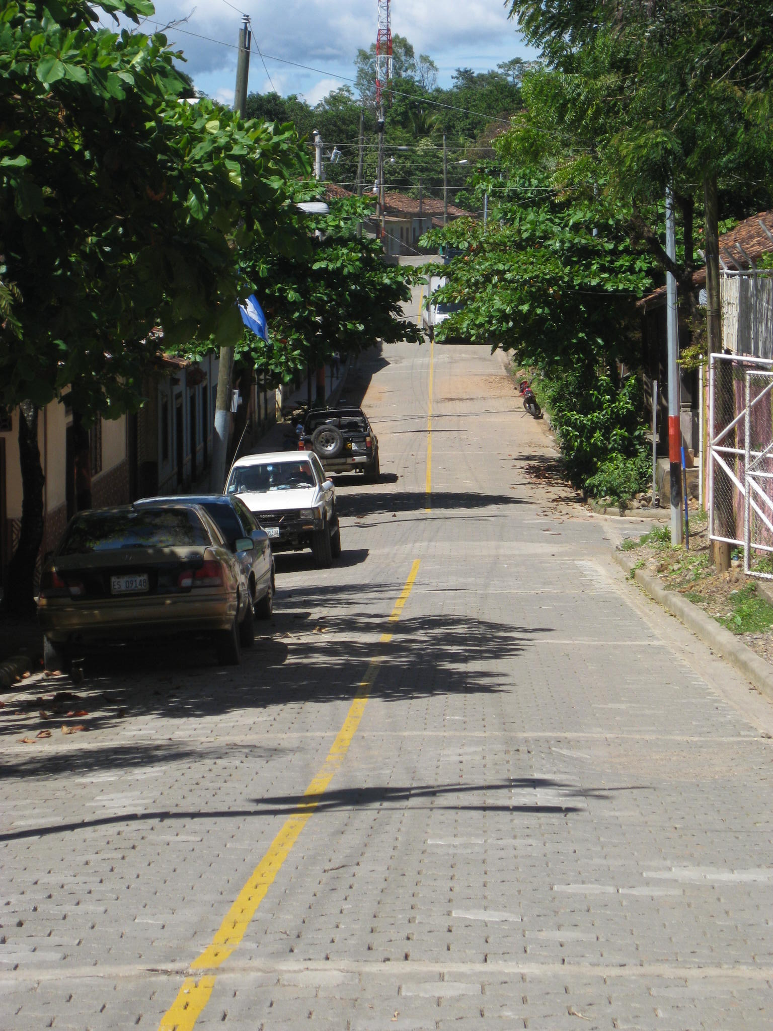 Características del Pueblo de Catarina, Municipio de Masaya, Nicaragua.